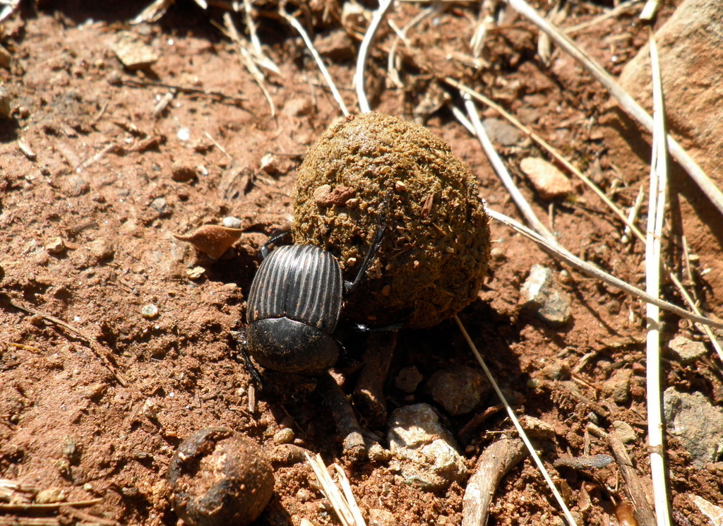 Valle del río de los Caballos